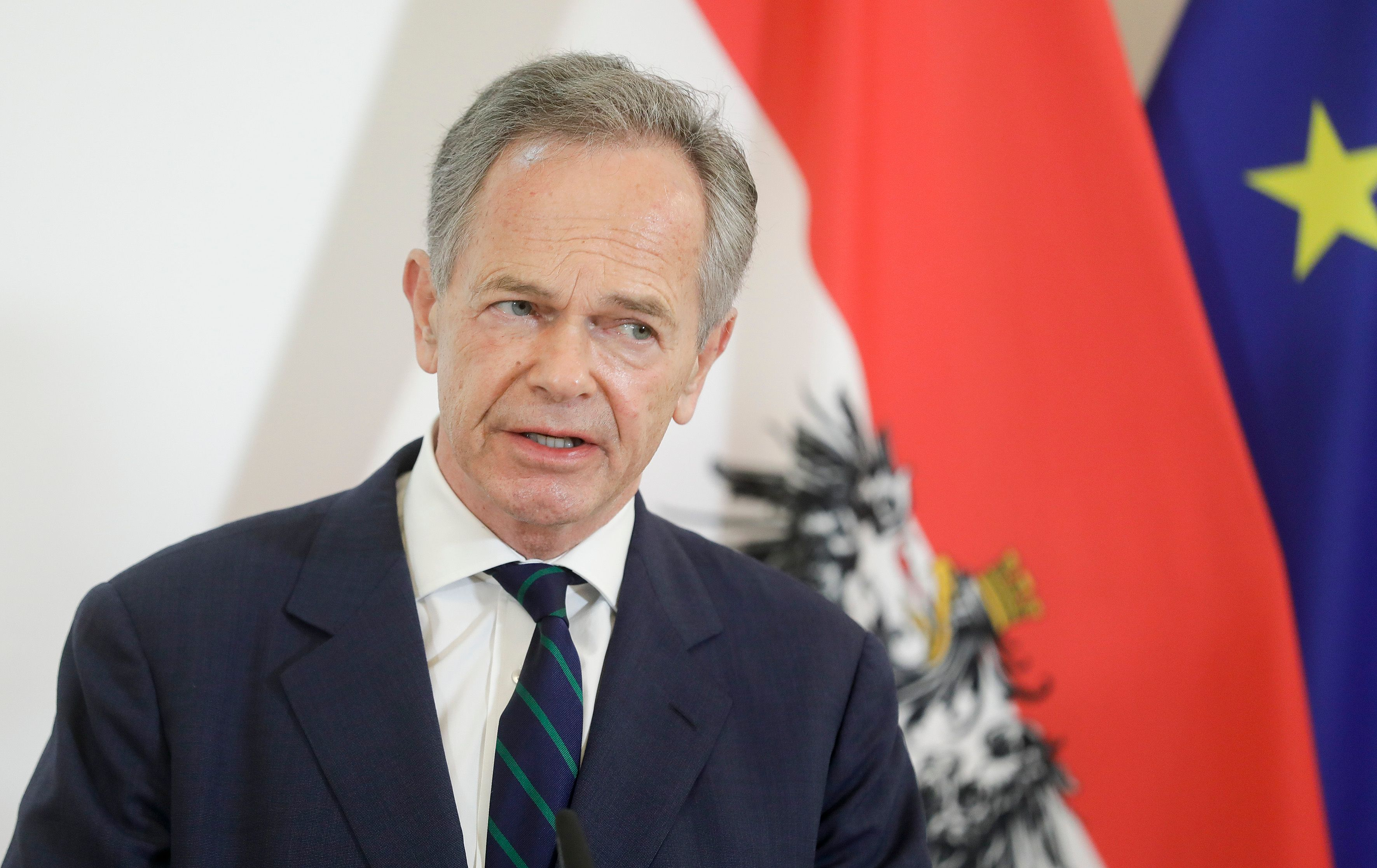 Am 16. März 2020 fand ein Pressestatement zu den Maßnahmen gegen die Krise im Bundeskanzleramt statt. Im Bild der Obmann der Bankensparte Andreas Treichl.